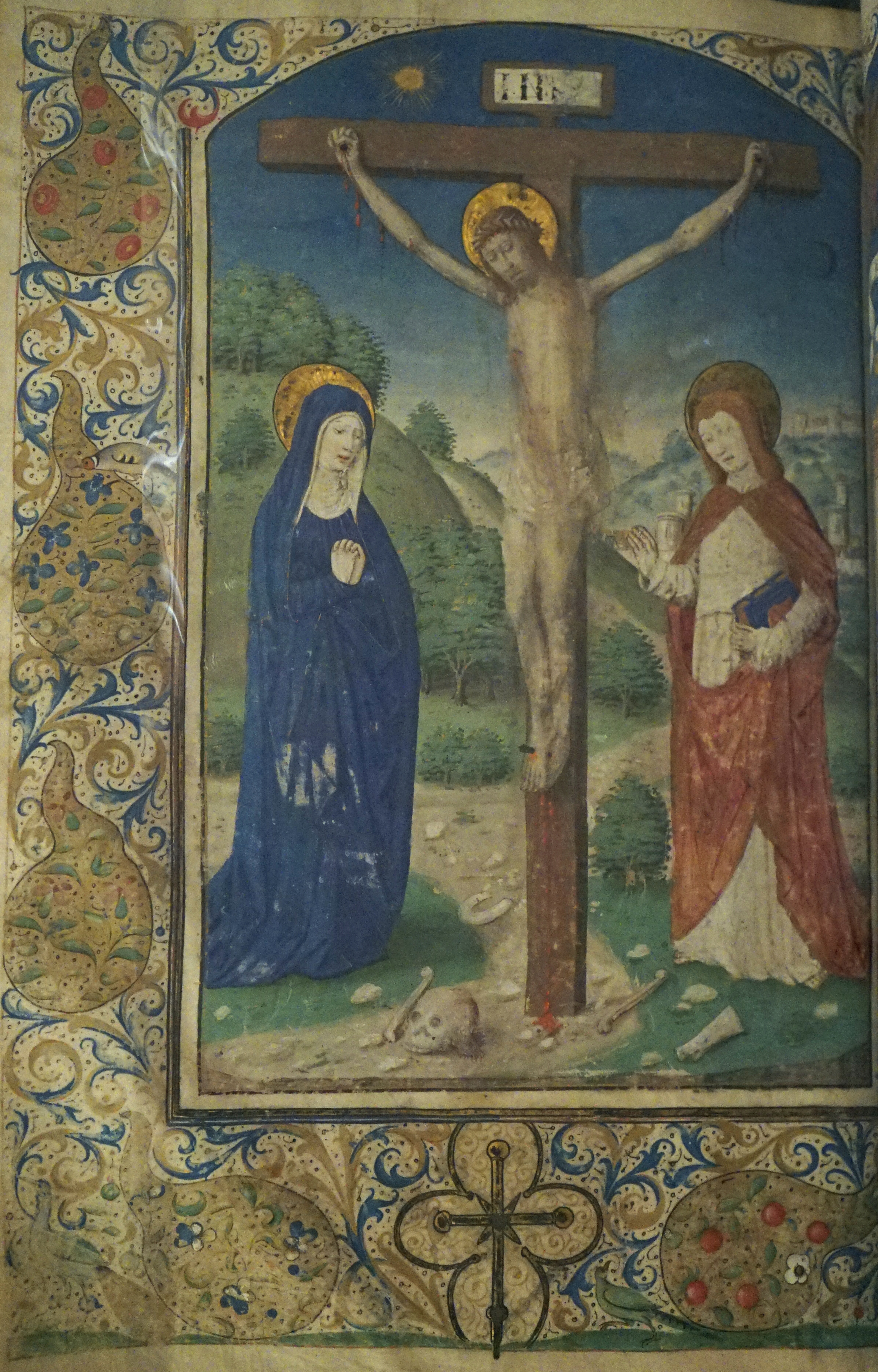 page du manuscrit représentant un Christus dolens ou Christ souffrant présenté au musée st-Remi.